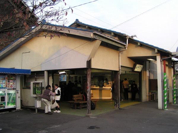 2005年11月23日に投稿者が撮影 藤野駅